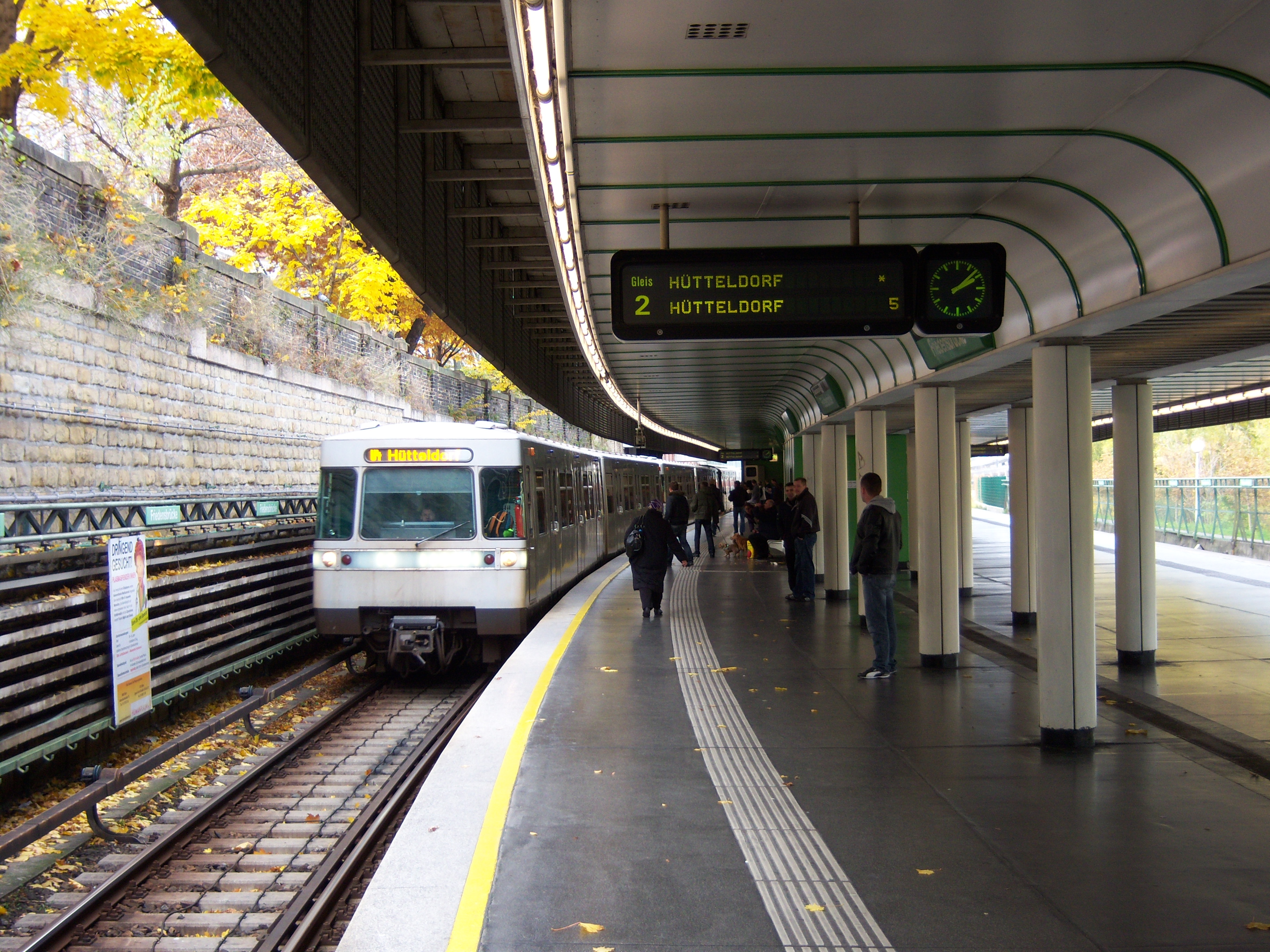 U-Bahn-Station Friedensbrücke